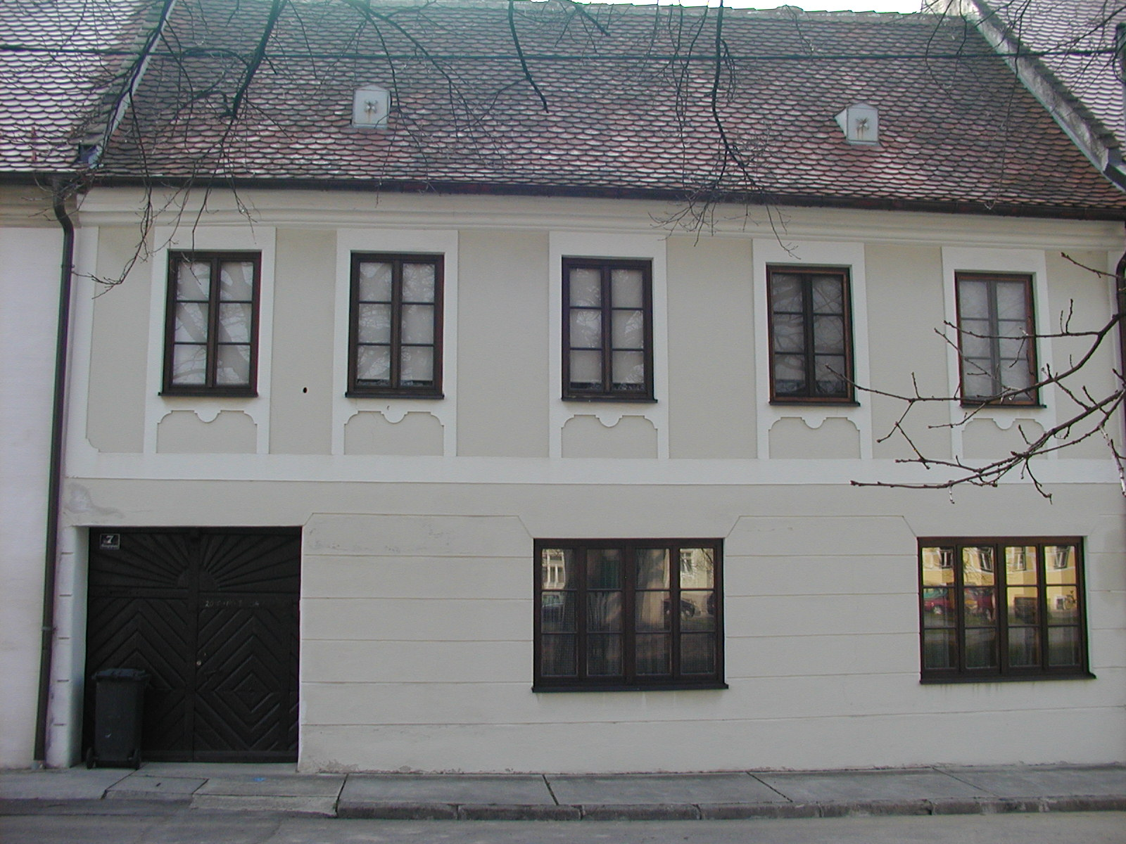 Sitzendorf Hauptplatz 7